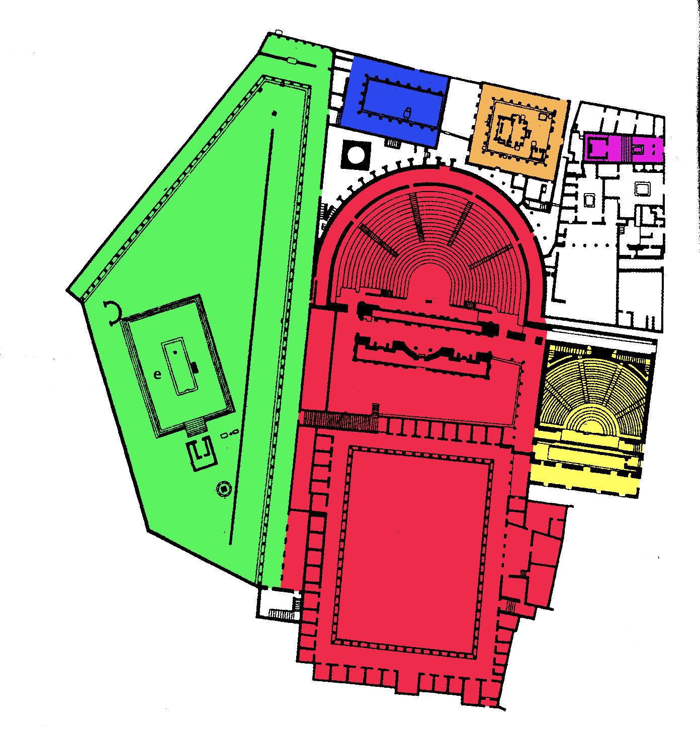 Theaterviertel und Forum Triangolare in Pompeji